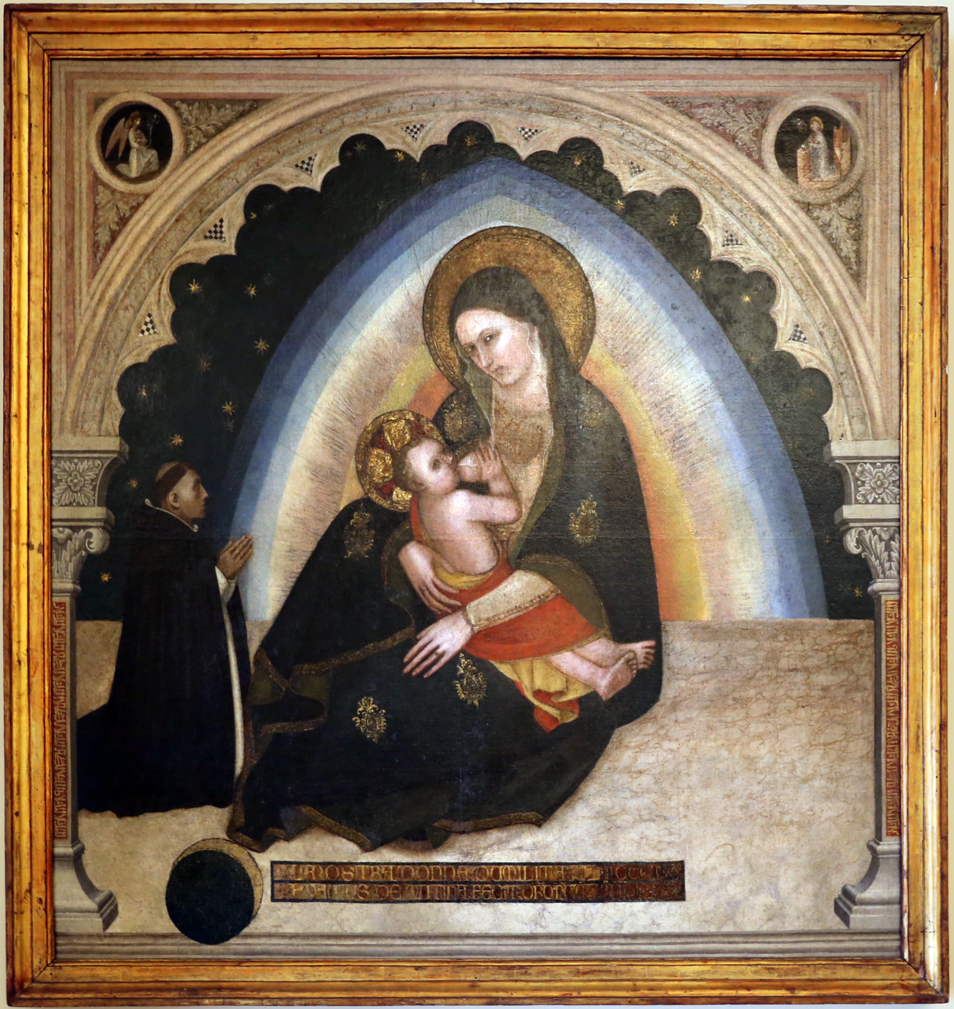 Palazzo dei Musei (Modena) This is a photo of a monument which is part of cultural heritage of Italy.